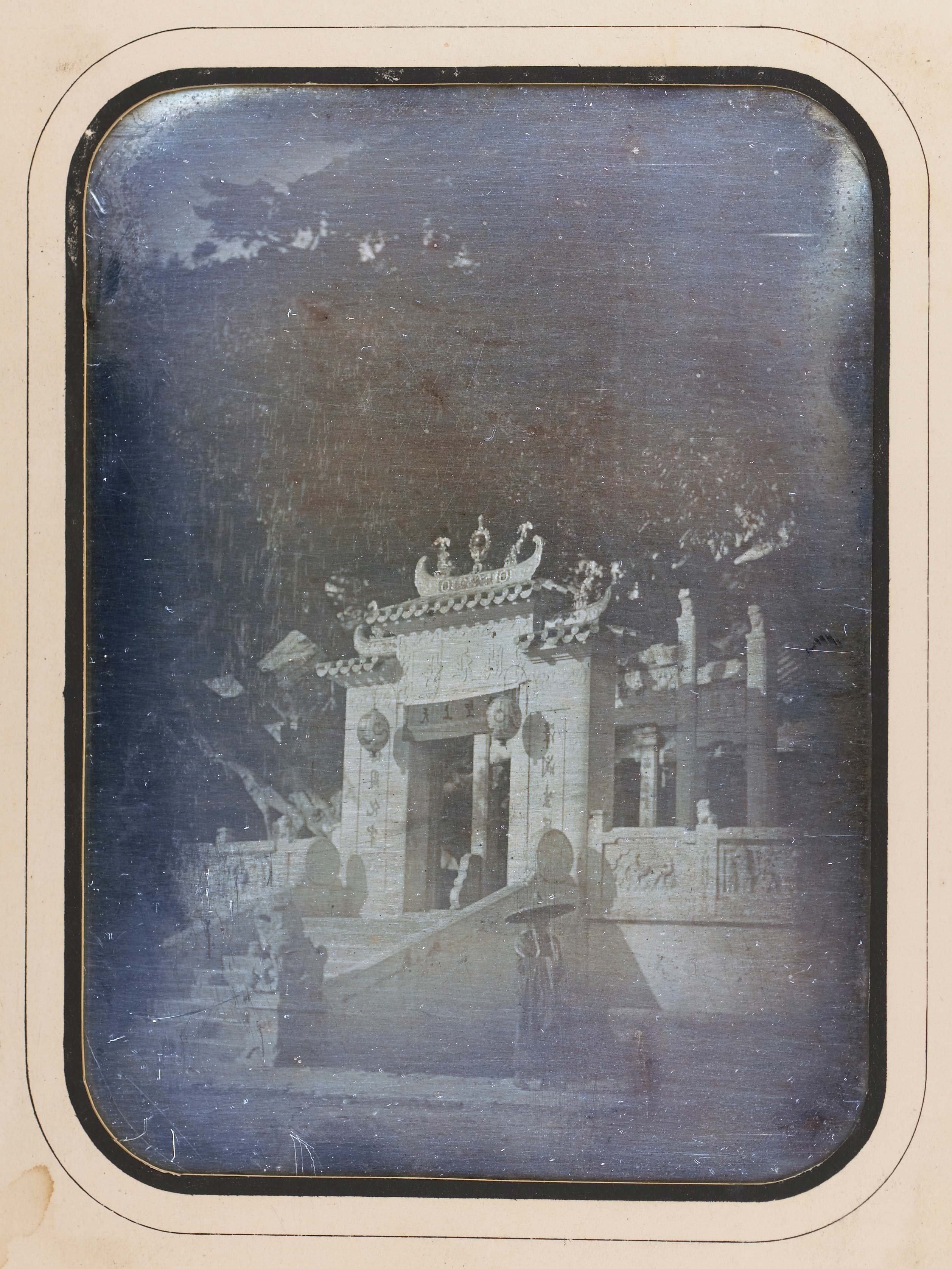 中文（台灣）: 法國業餘攝影師于勒·埃及爾於1844年拍攝的澳門媽祖閣，是中國最早的照片之一